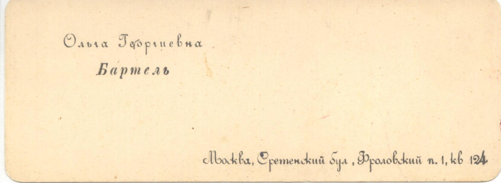 Визитка Ольги Бартель